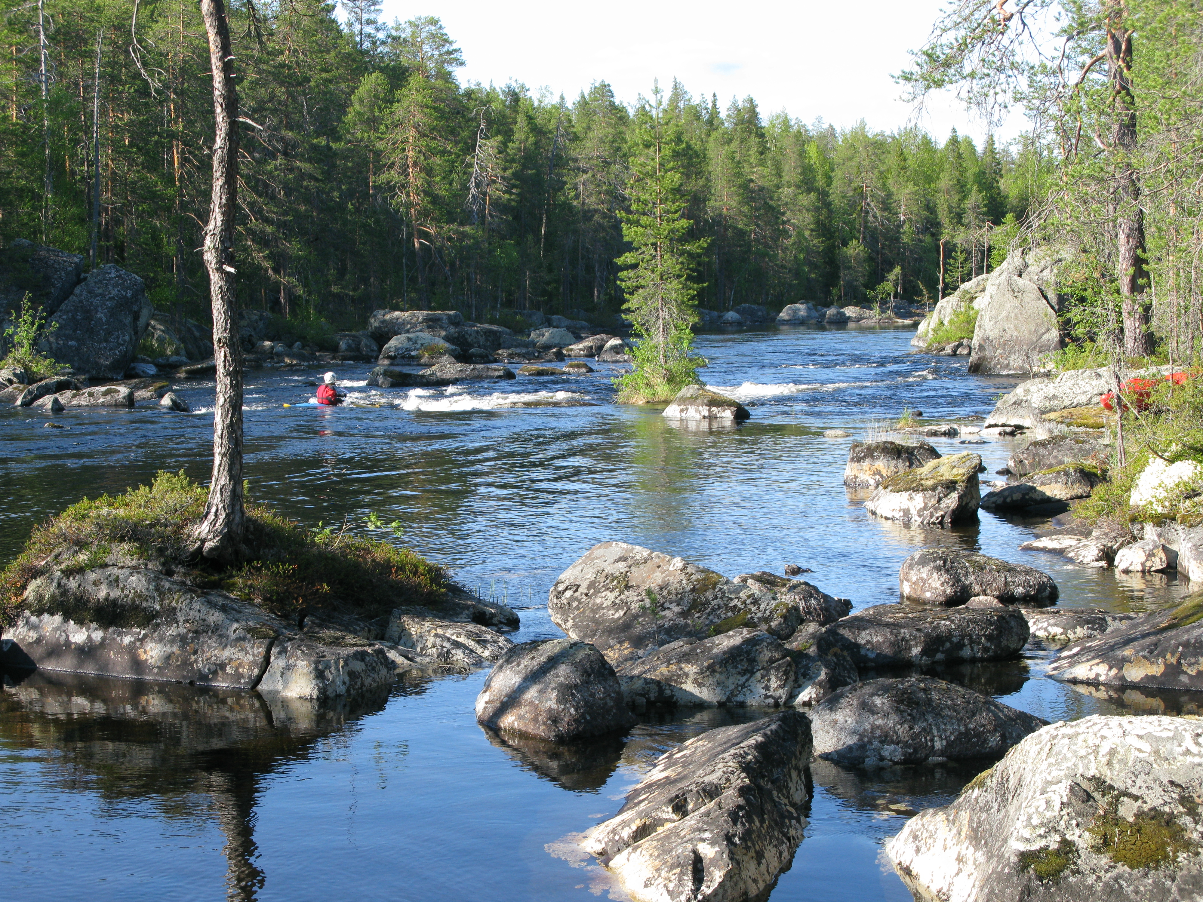 Костомукшский заповедник, Костомукшский городской округ This image is related to the protected area of Russia number 1000052